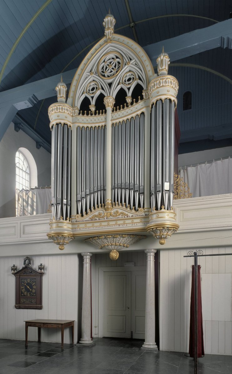 Hervormde kerk van Buiksloot: Interieur, aanzicht orgel, orgelnummer 250 (opmerking: Gefotografeerd voor Het Historische Orgel in Nederland 1850-1858)